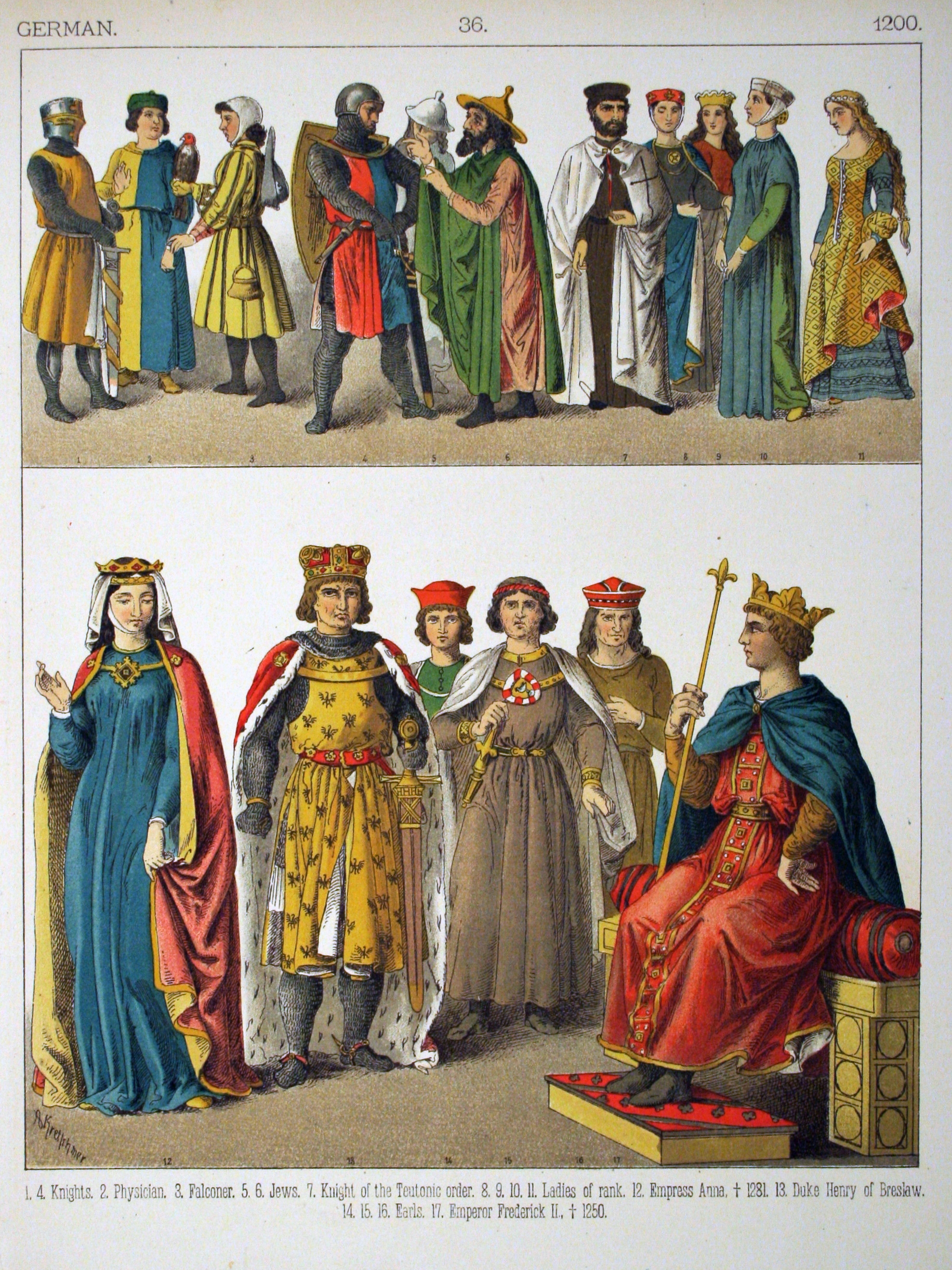 1200, German